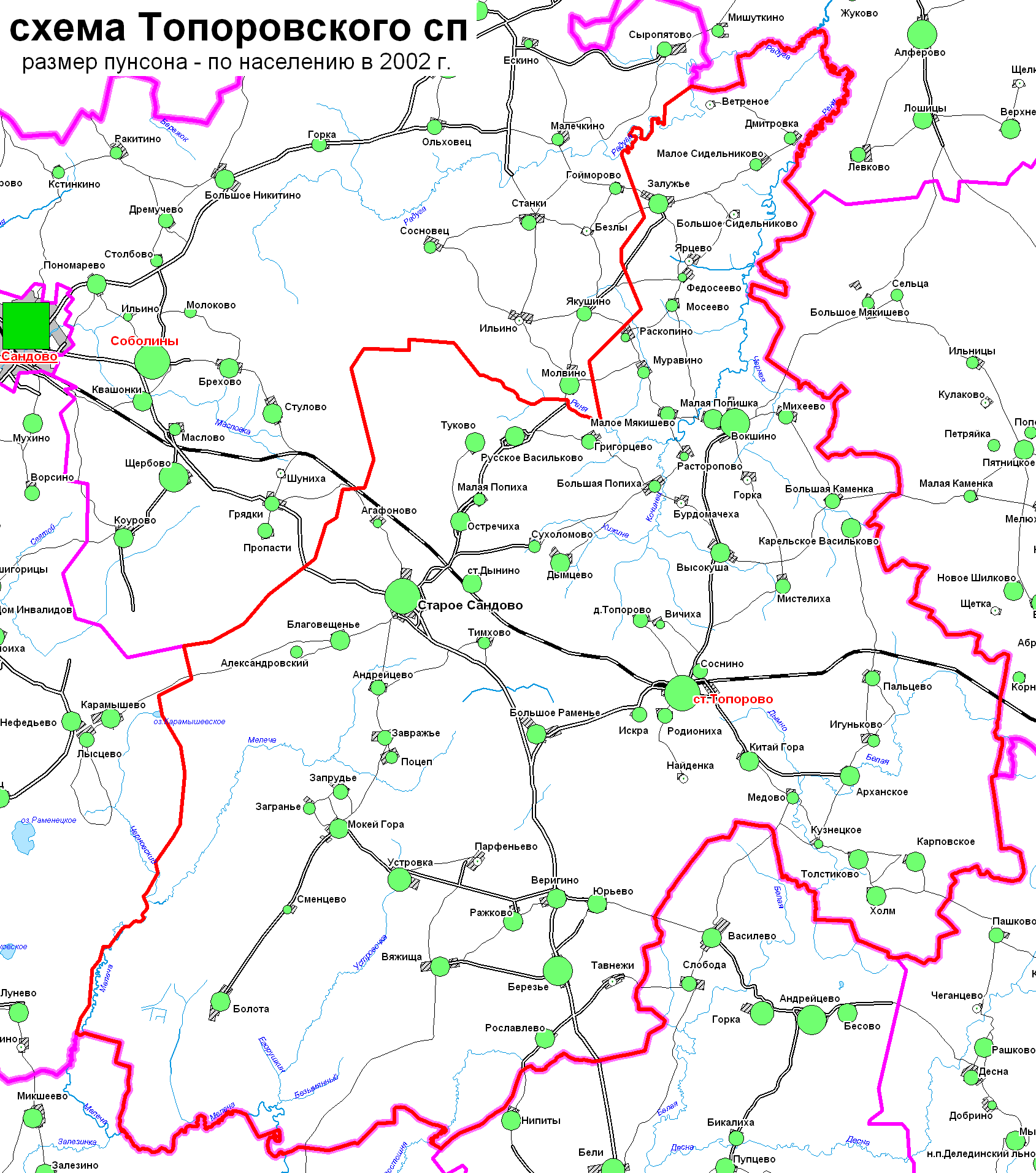 Схема Топоровского сп